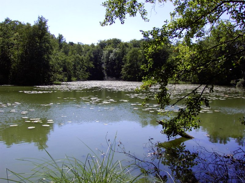 Ein See im Spreewald